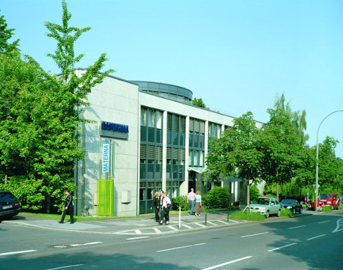 Materna Gebäude frontal